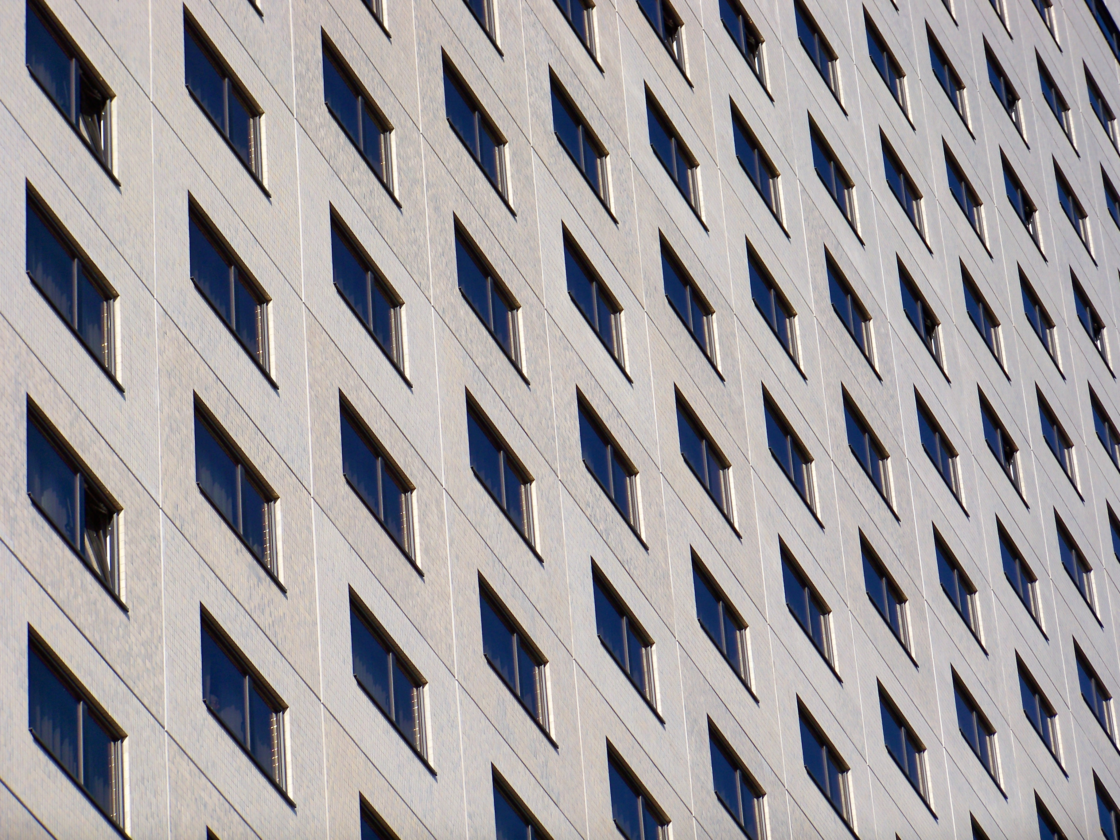 Fenster der Südfassade des Hotel The Westin Leipzig aus der Nordstraße